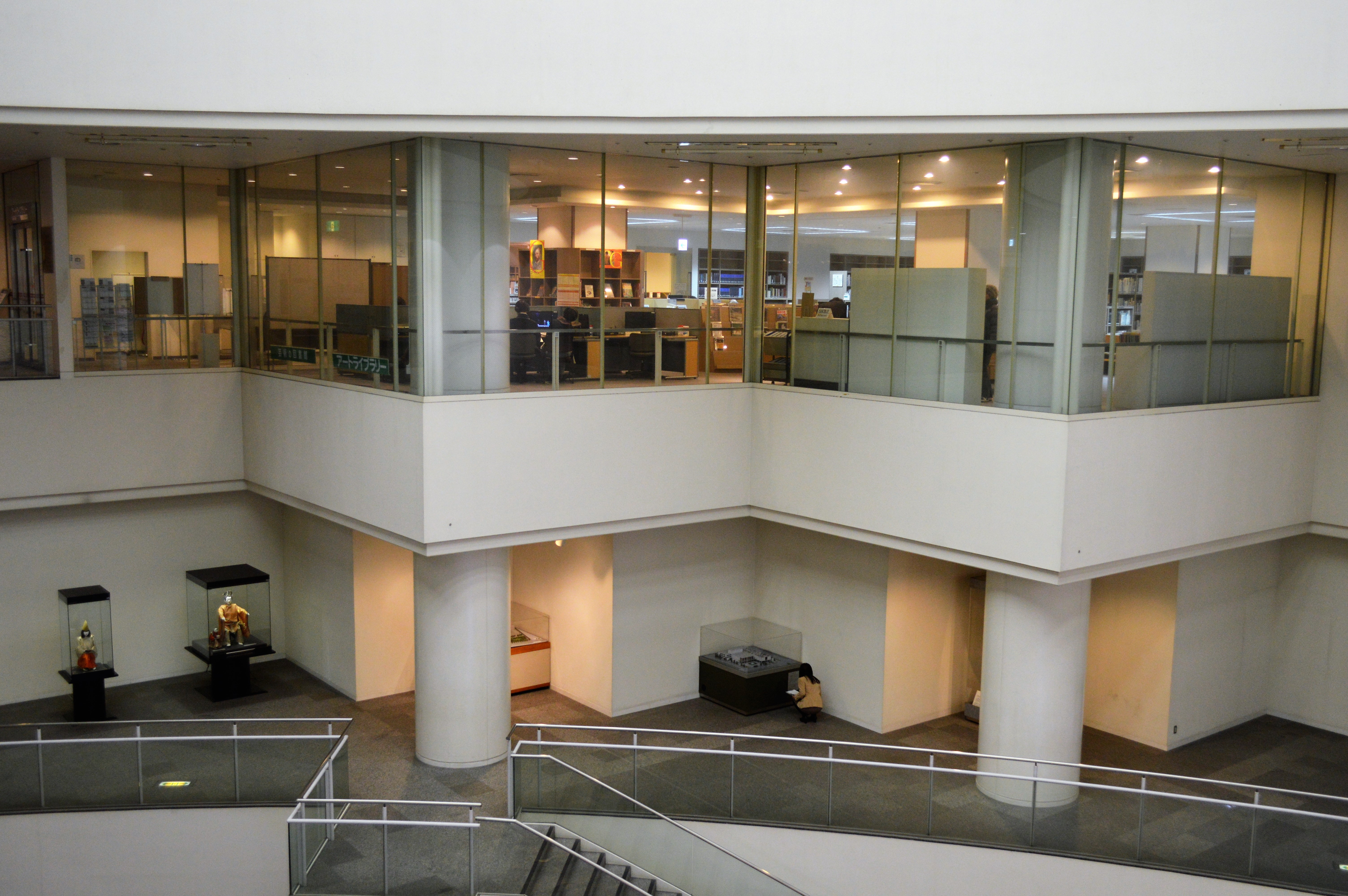 愛知県名古屋市東区東桜（栄）にある愛知芸術文化センターアートライブラリー。同一フロアから図書館内部を見る。